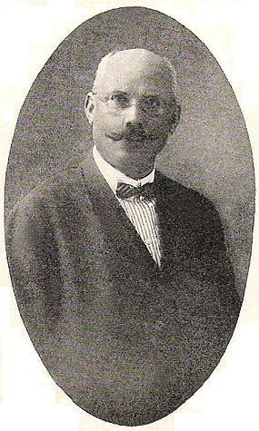 Auguste Biecheler de l'Avant-garde du Rhin en 1921.